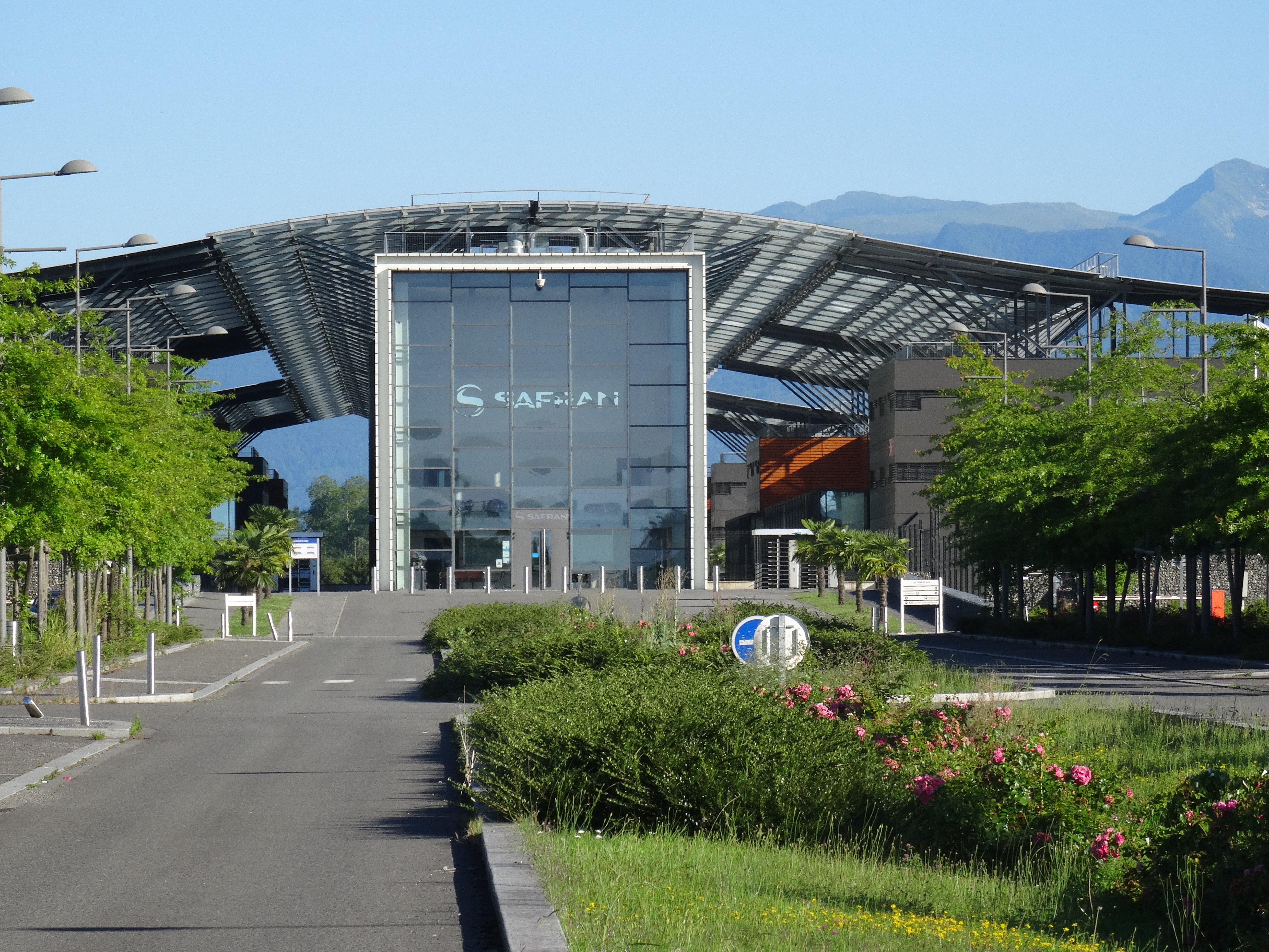 Siège de l'usine Turboméca à Bordes